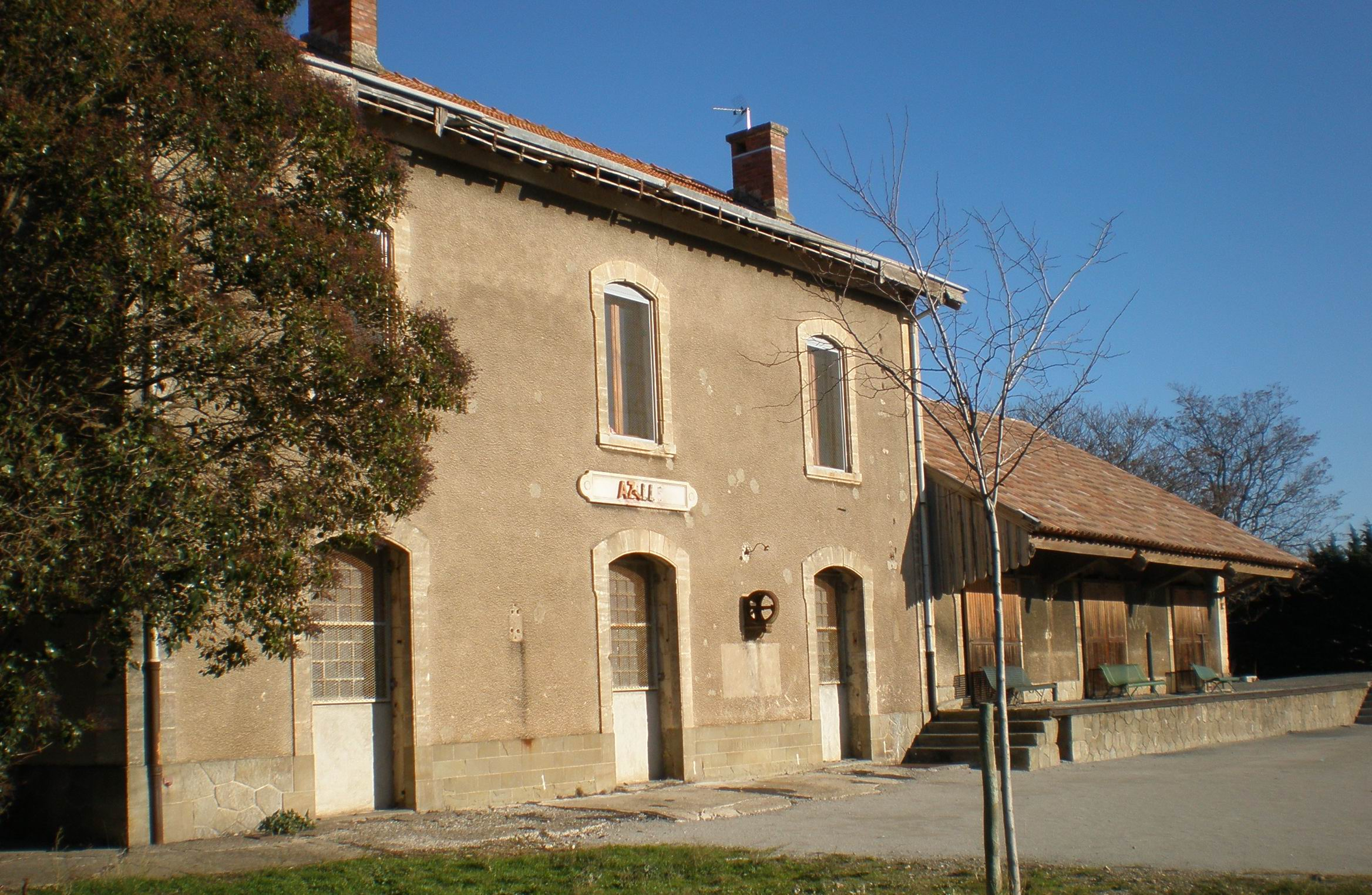 La gare désaffectée d'Azille